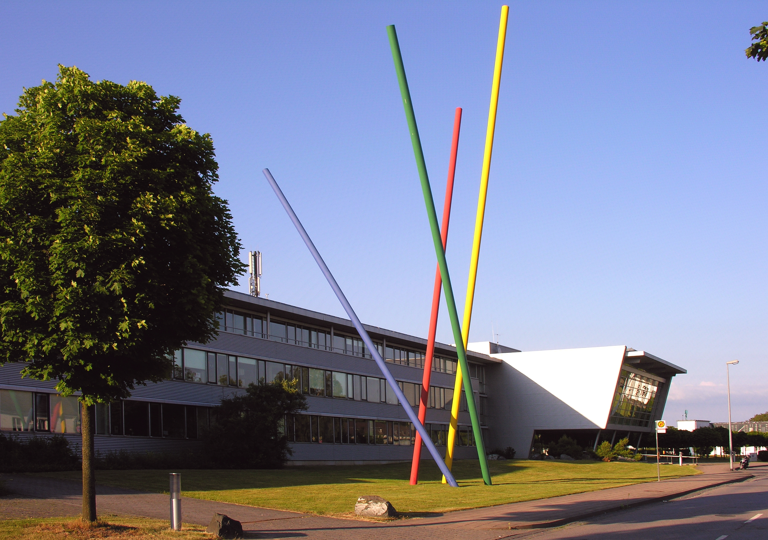 Braunschweig OT Waggum - Westansicht der Vorderseite des mehrflügeligen Gebäudes (Grundriss E-förmig) vom Luftfahrt-Bundesamt am Flughafen Braunschweig-Wolfsburg in Niedersachsen - Foto Wolfgang Pehlemann DSCN5187